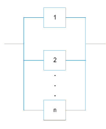 Diagrama de sistema k-out-of